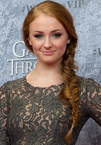 Atriz britânica Sophie Turner na premiere de Game of Thrones.